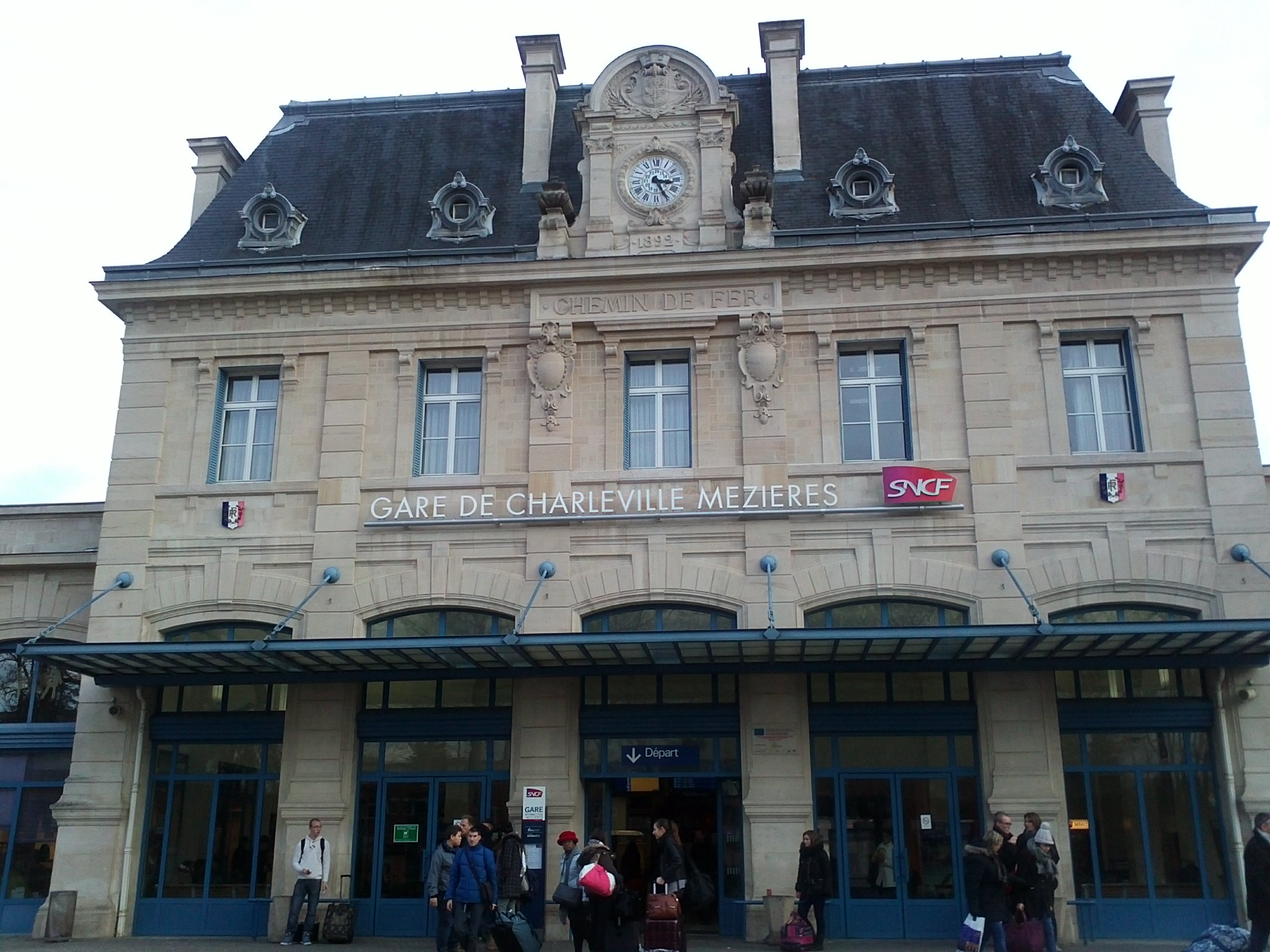 沙勒维尔-梅济耶尔站（Gare de Charleville-Mézières）